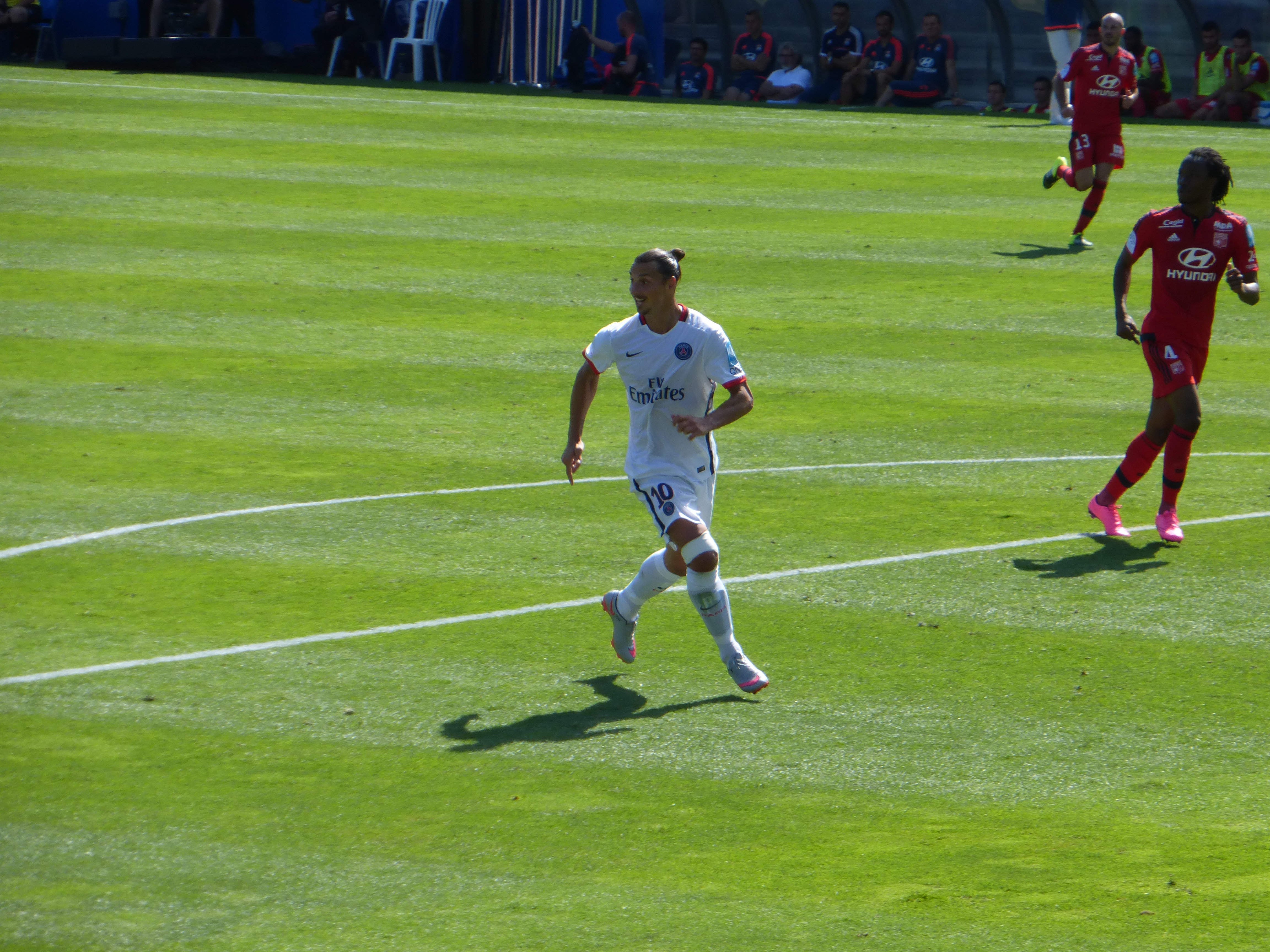 Zlatan Ibrahimovic, Bakary Koné, Montréal 2015